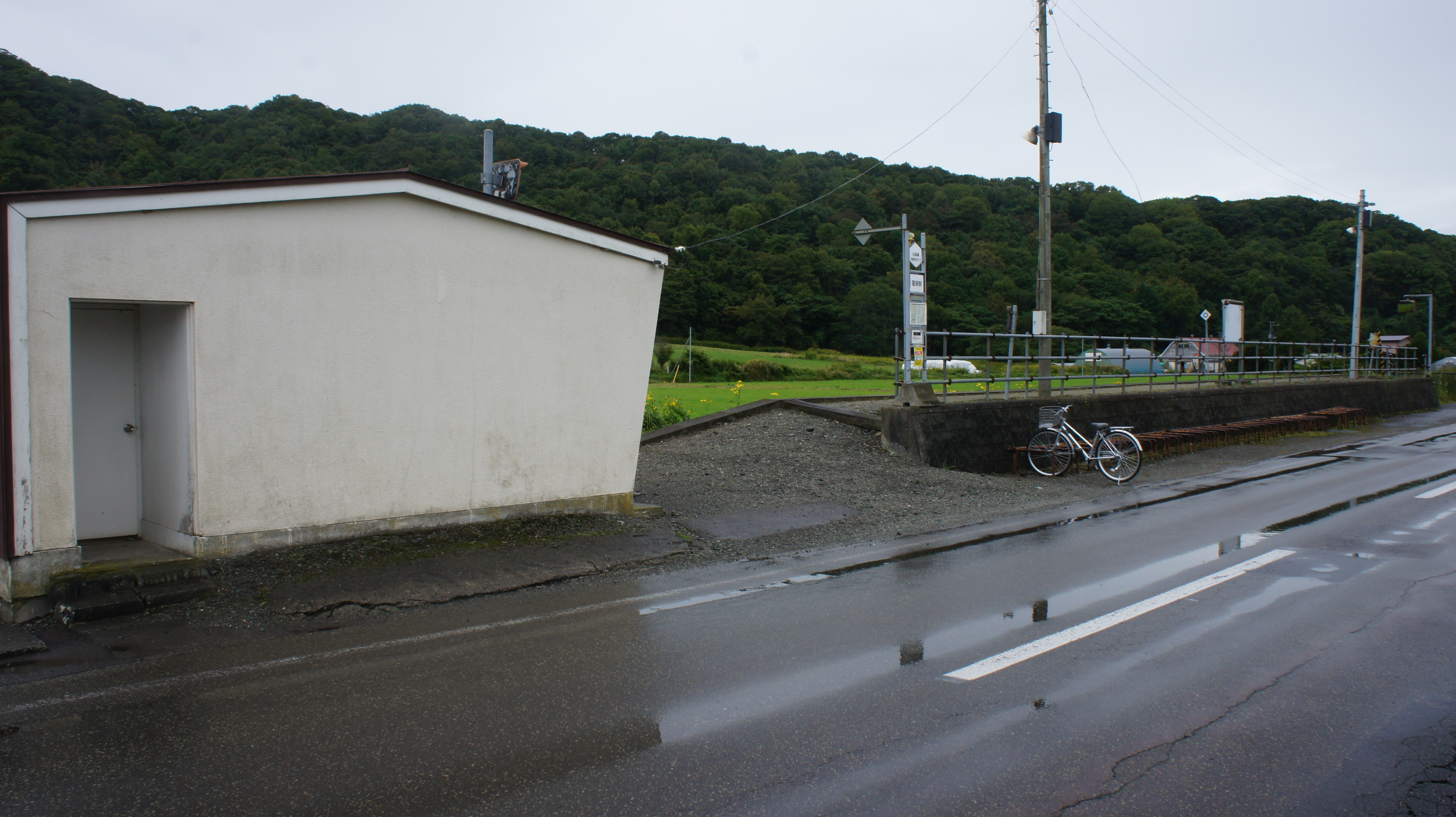 JR日高本線・蓬栄駅全景 Sony NEX-3